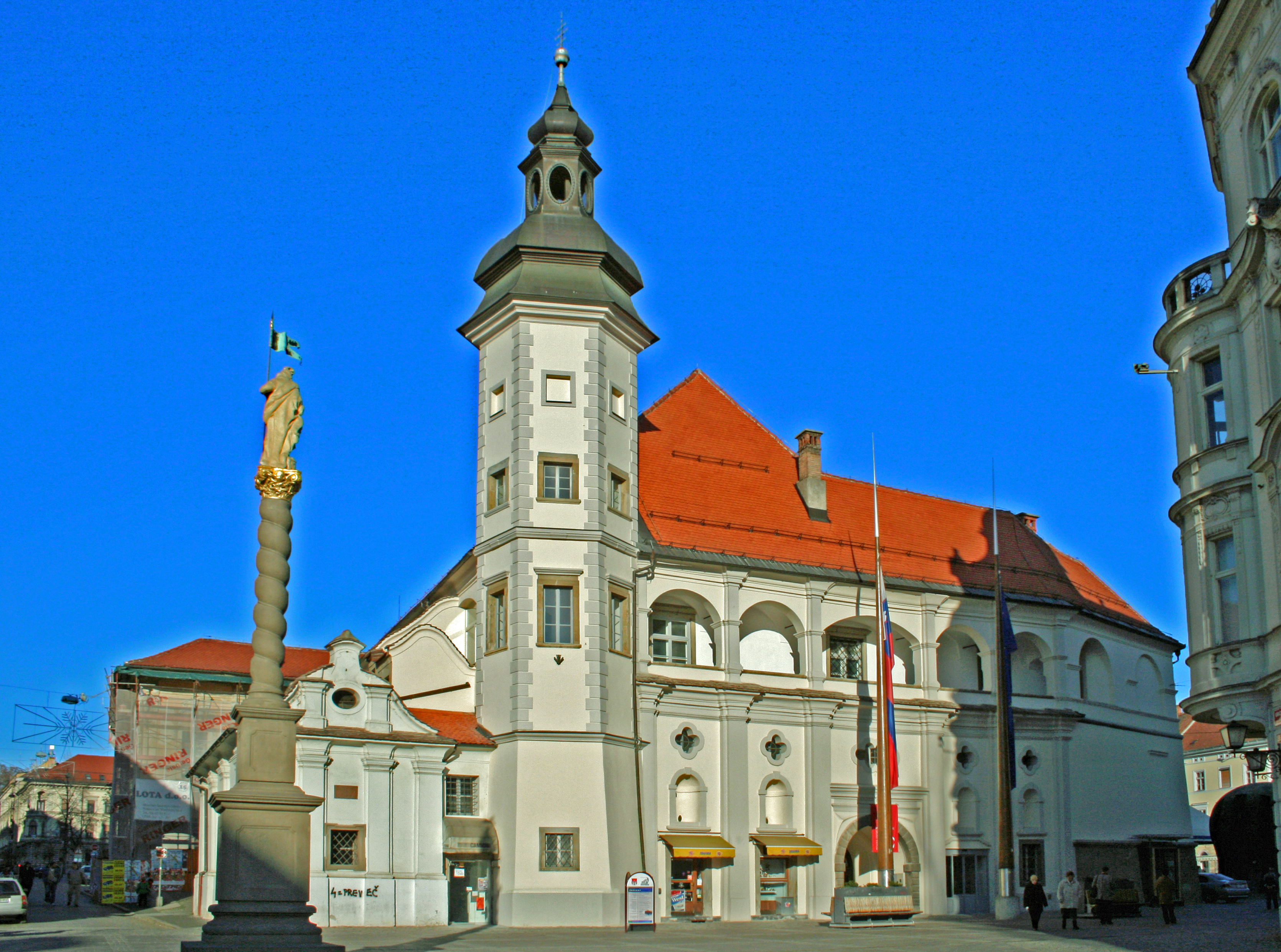 Maribor: Grad (deutsch: Burg; english: Castle)